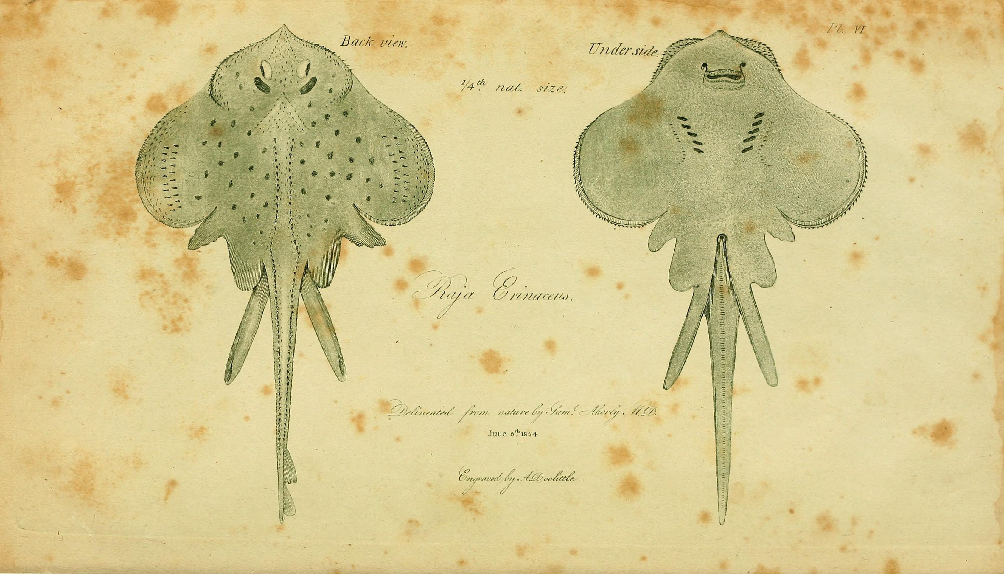 Иллюстрация, сопровождавшая первое описание вида (1825) Leucoraja erinacea syn. Raja erinaceus